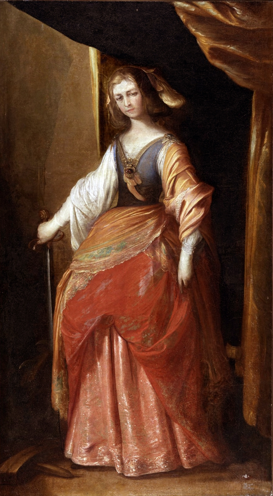 El lienzo, que data de la segunda mitad del siglo XVII y está firmado por su autor como «SEBASTIANUS», representa a Santa Catalina de Alejandría.